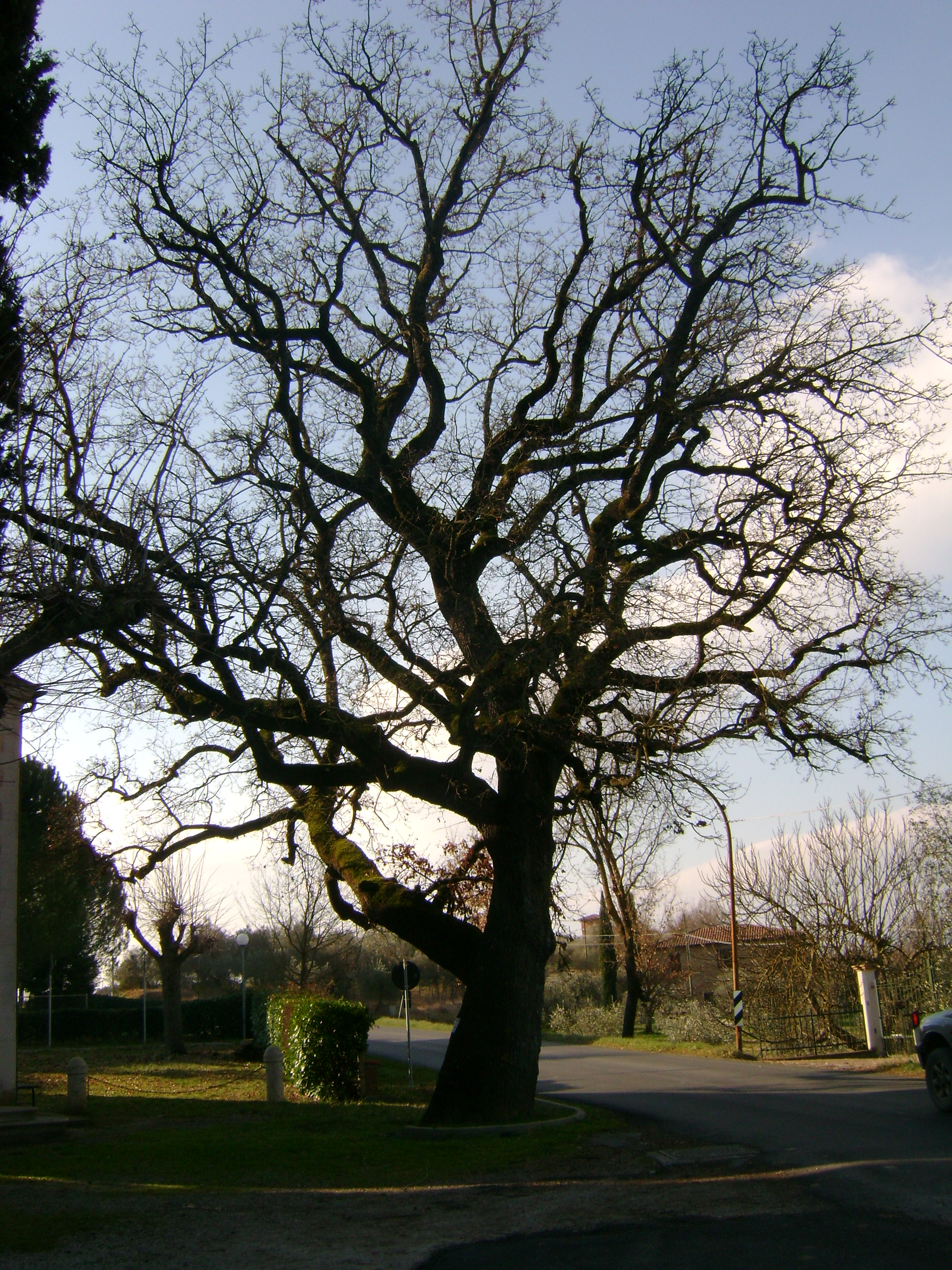 Quercia del Pentimento - Petrignano del Lago